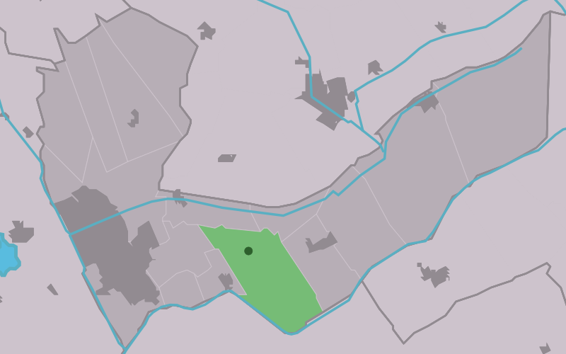 Kaartsje fan himrik fan Ketlik